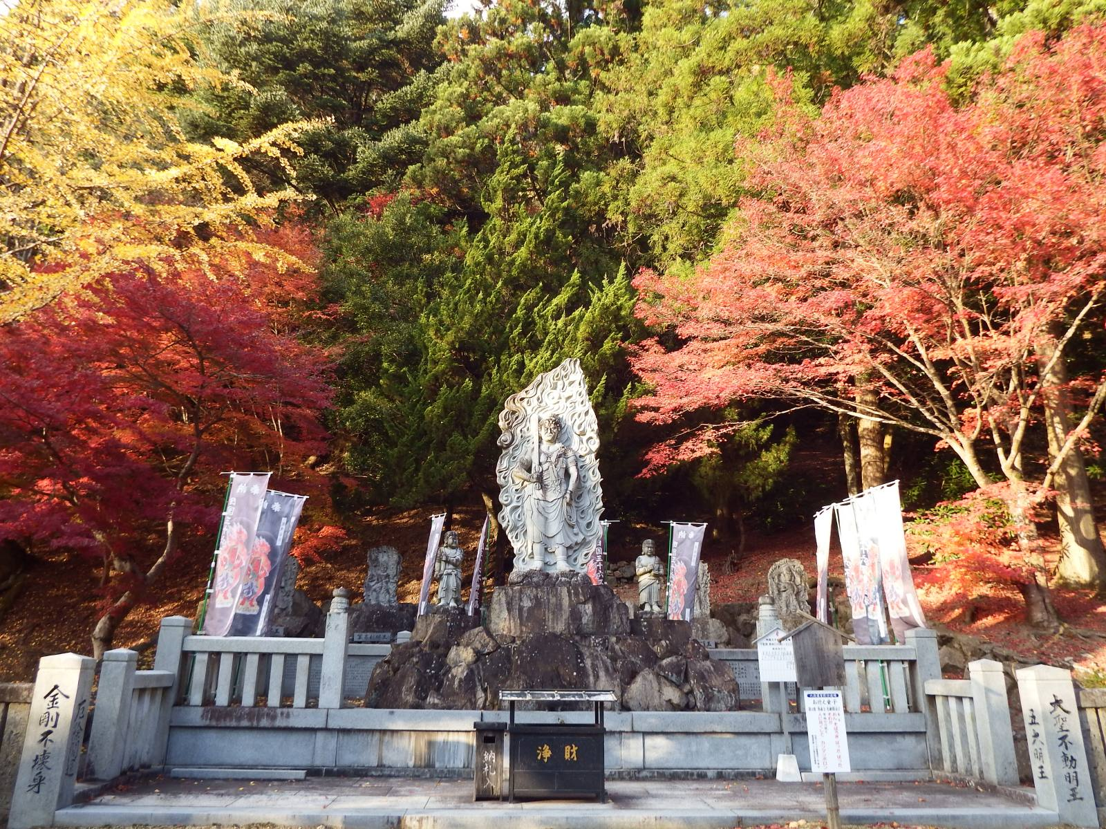 箸蔵寺の五大明王